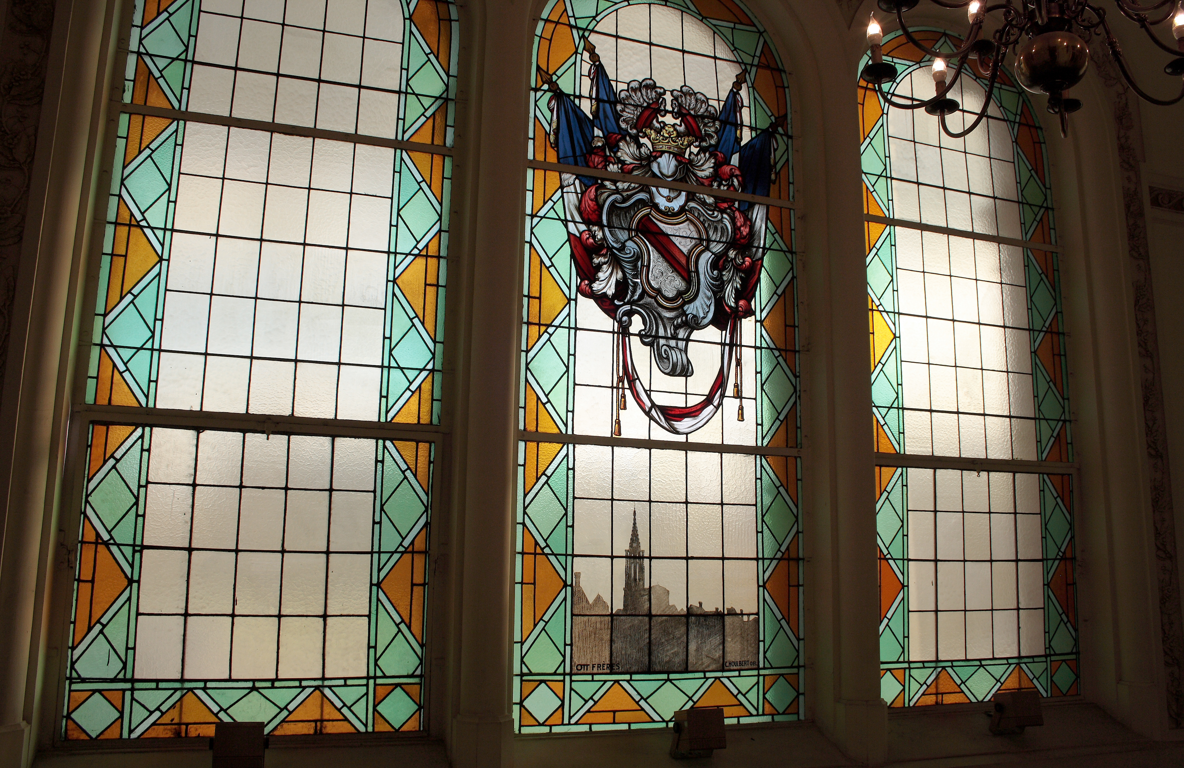 Vitraux du hall d'accès direct (non ouvert au public) aux salons de l'Empereur (devenus le Salon Grand Voyageur).La représentation de la silhouette de la Cathédrale Notre-Dame est un élément de la partie centrale.